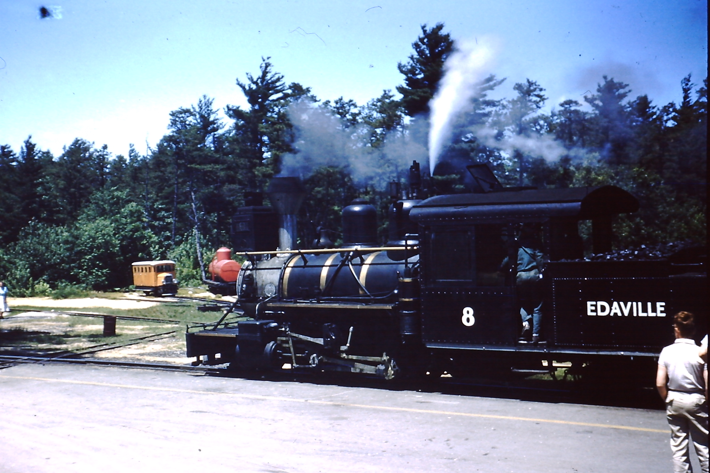 Edaville Railroad, 1959